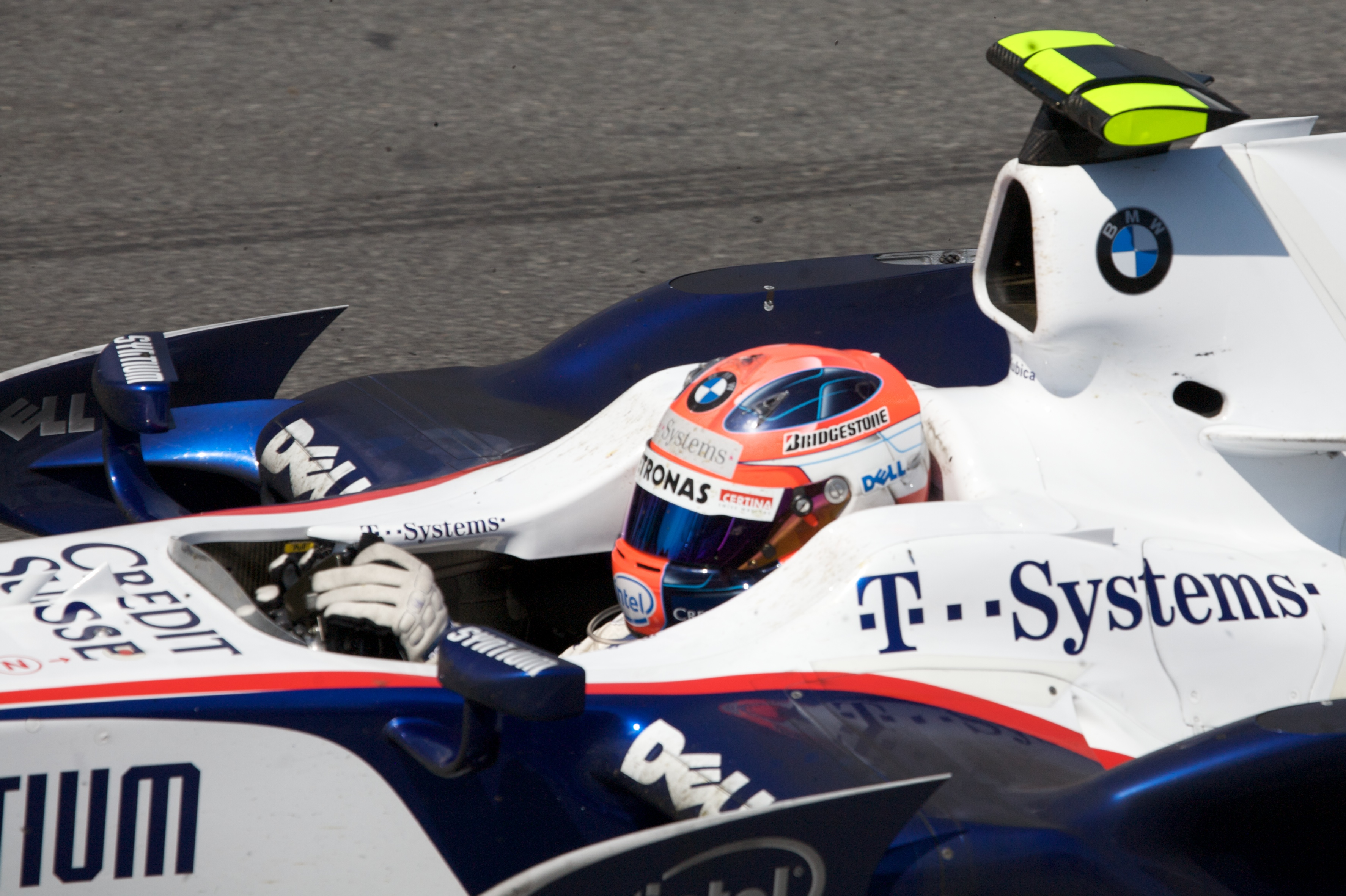 Kubica after Canada 2008